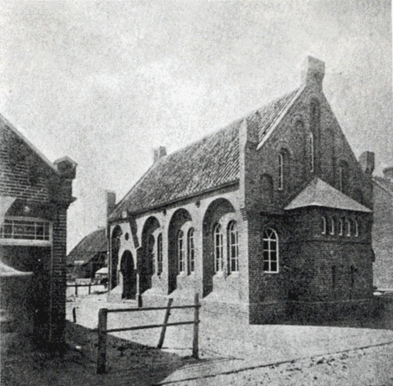 Synagoge Norderney, Aufnahme 1880